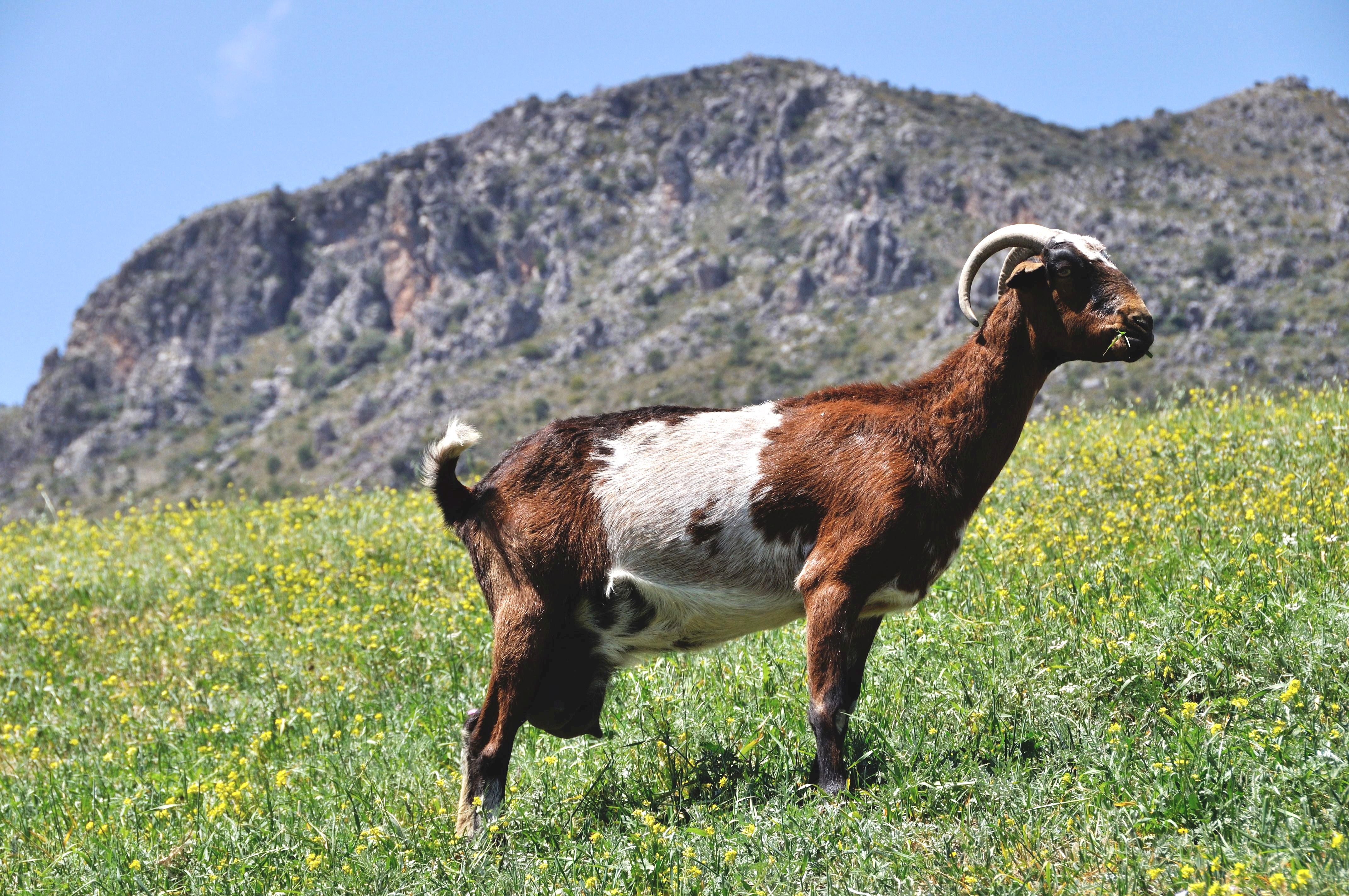 Hembra de Raza Payoya, sesnegra cinchada. Propiedad José Mª Fernández Castro. Grazalema - Cádiz.